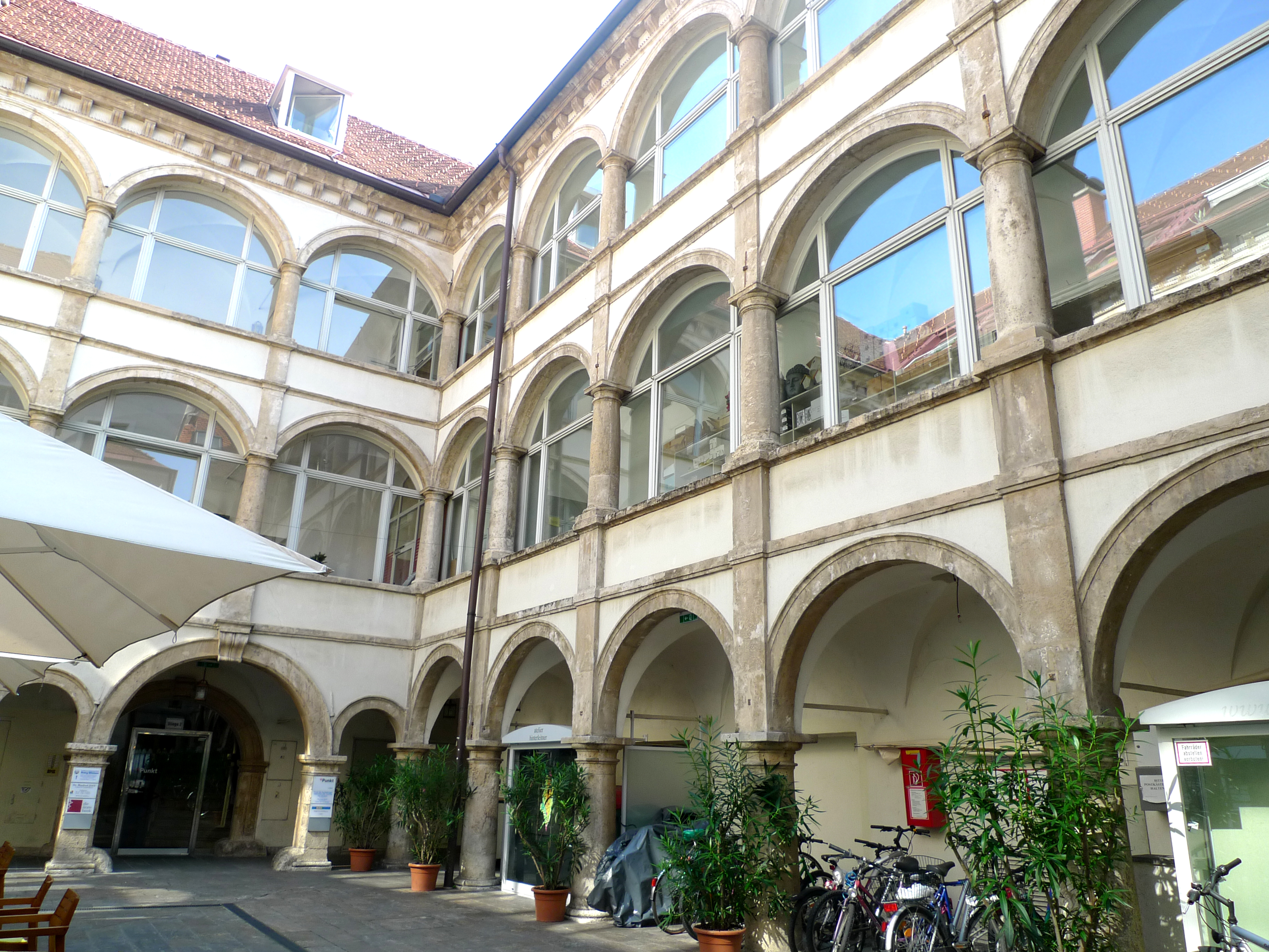 Generalihof, ehem. Palais Breuner